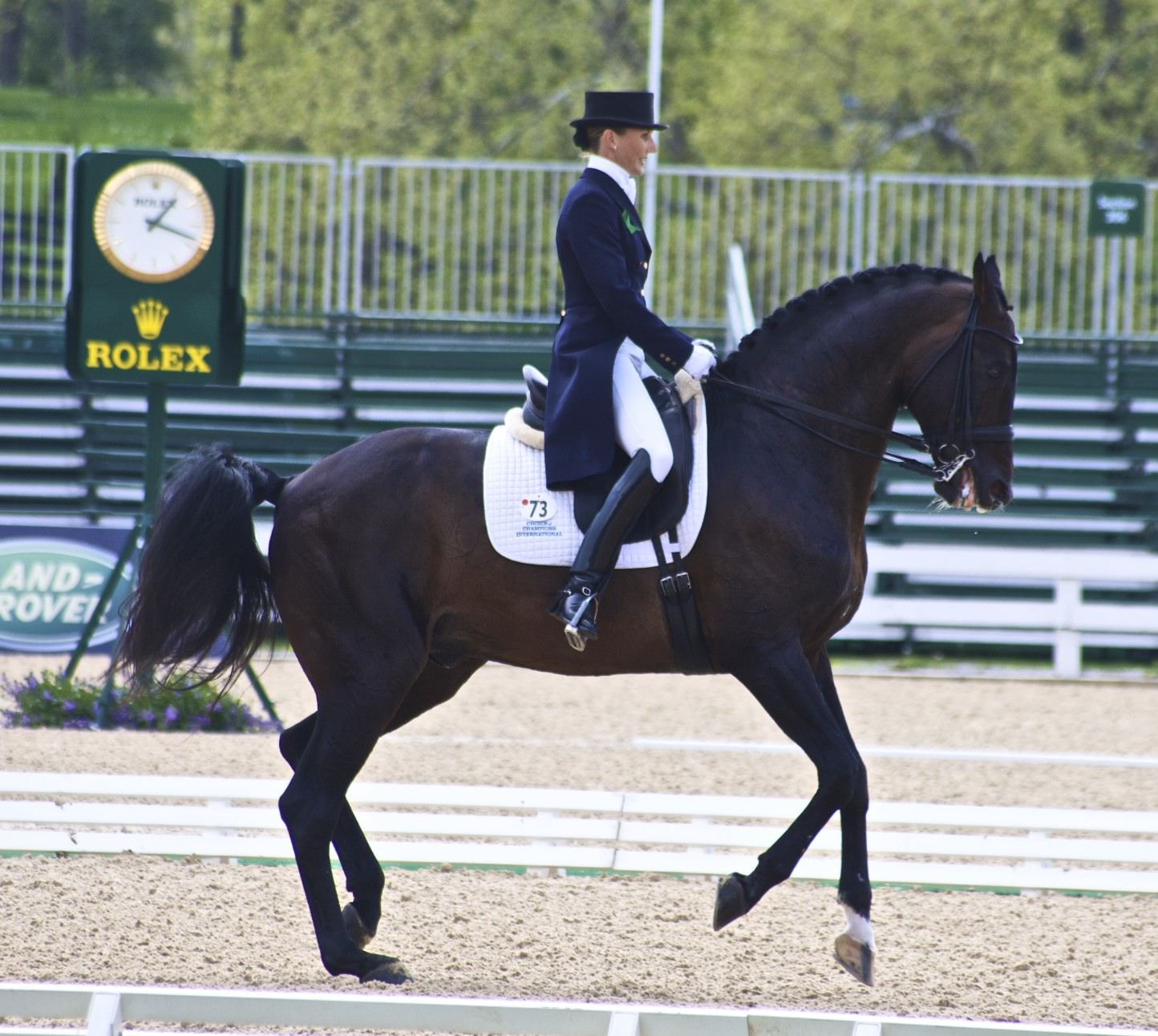 Leonberg (Zweibrücker) & Mikala Gunderson